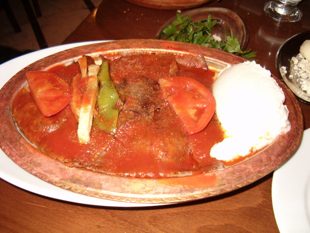 Iskender Kebap